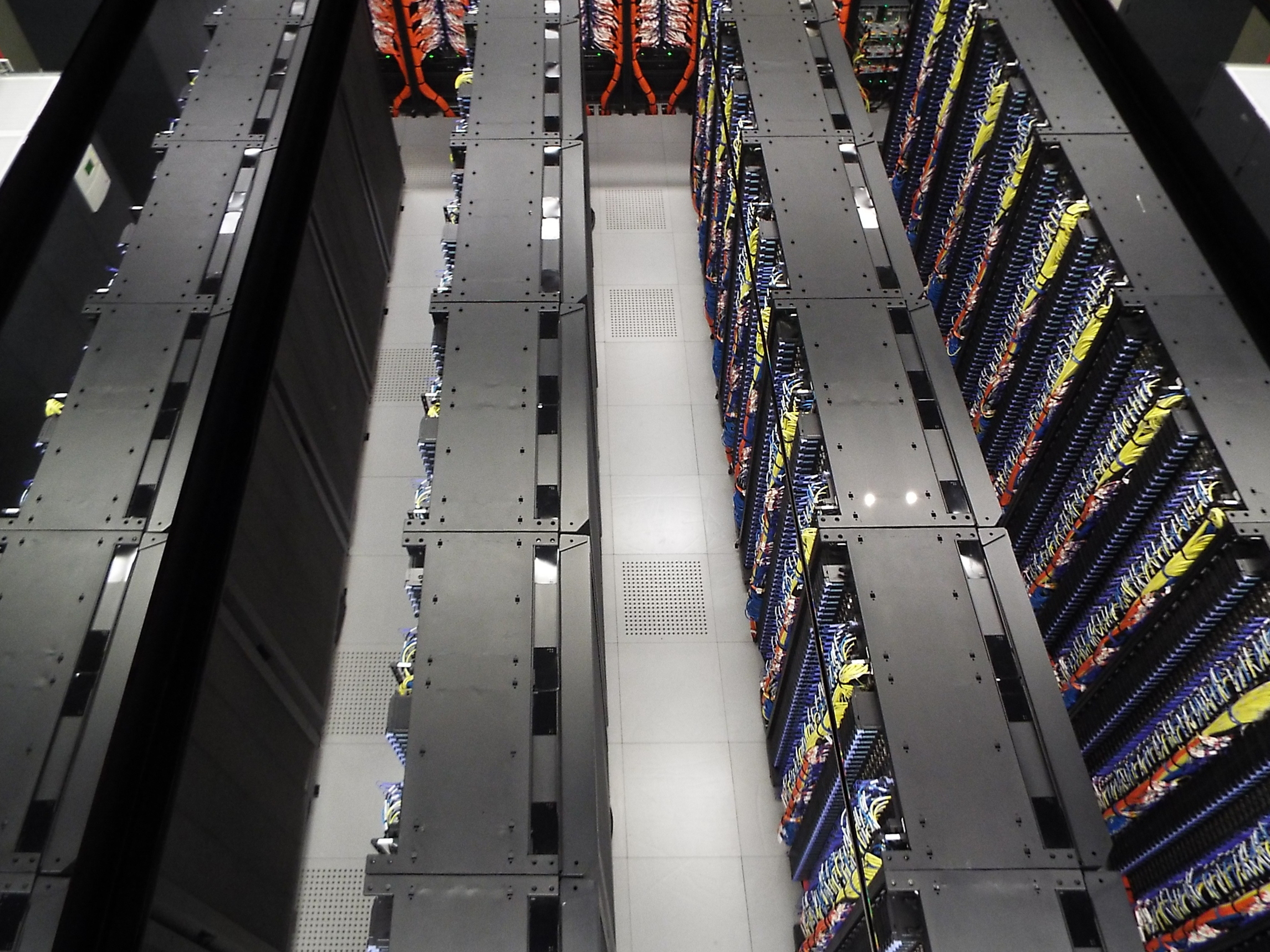 Vista cenital del supercomputador MareNostrum III, situado en la antigua capilla junto a la Torre Girona, en el Barcelona Supercomputing Center-Centro Nacional de Supercomputación, España.